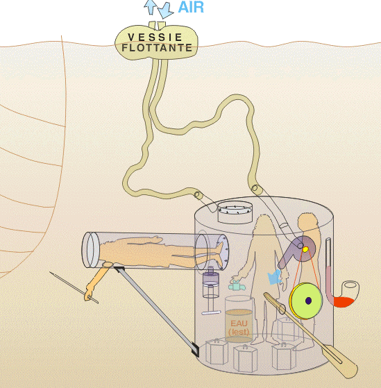 dessin du deuxieme modèle sous-marin